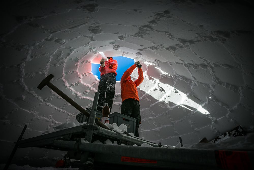 Iglu Weltrekord 2016 in Zermatt